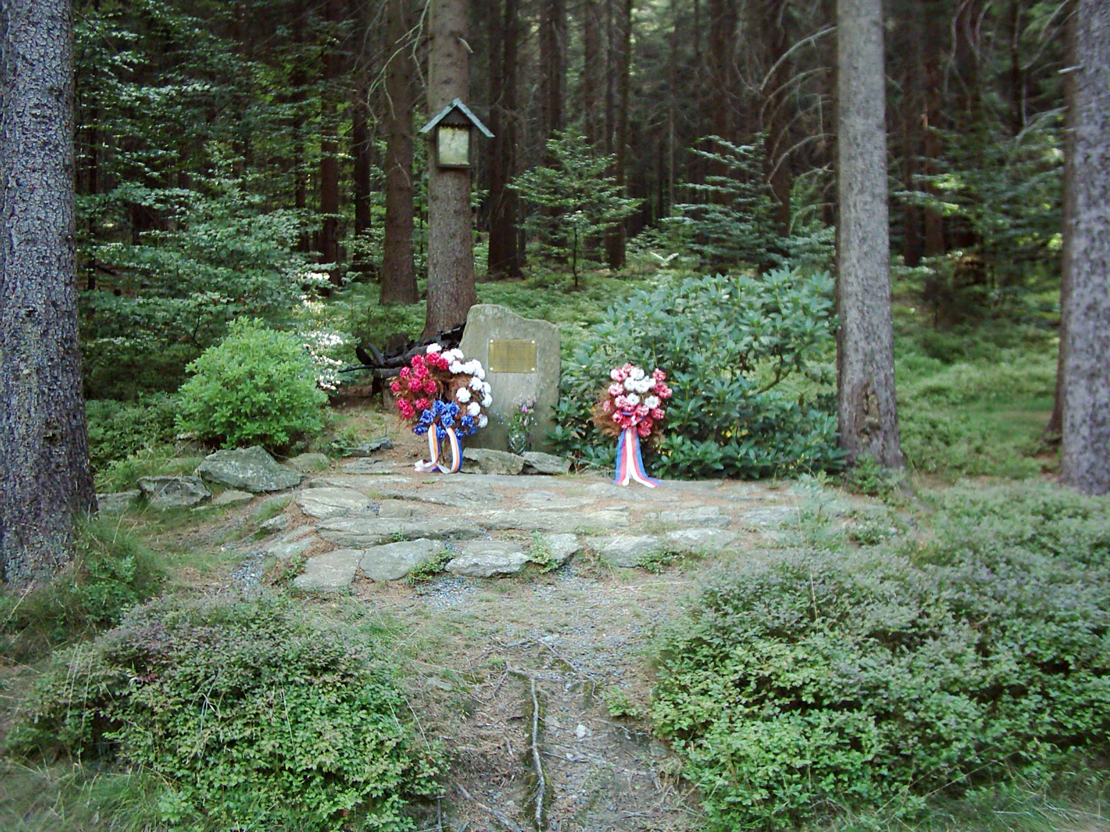 Památník americkým vojákům padlým na území obce Díly